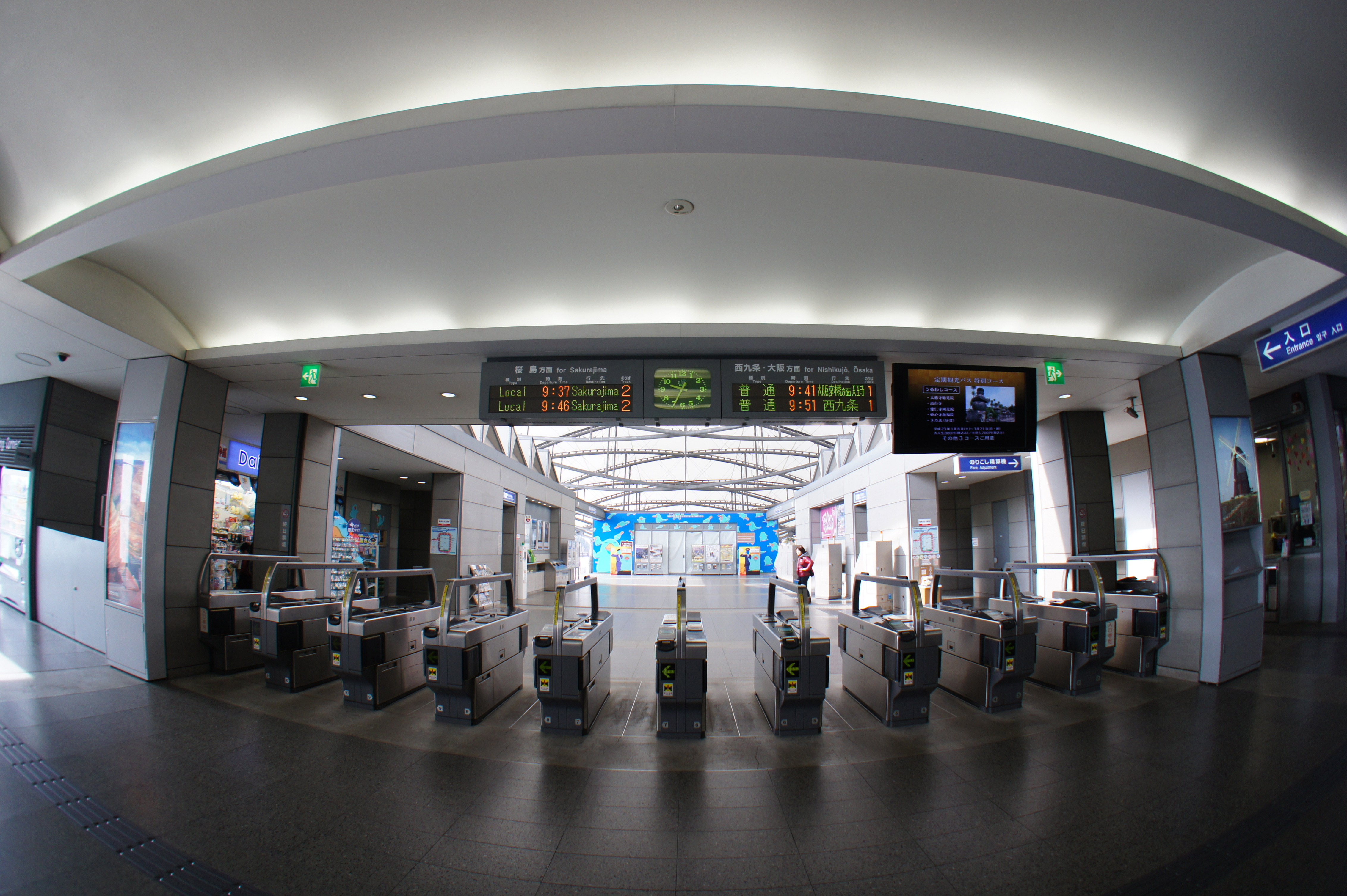 ユニバーサルシティ駅 改札口